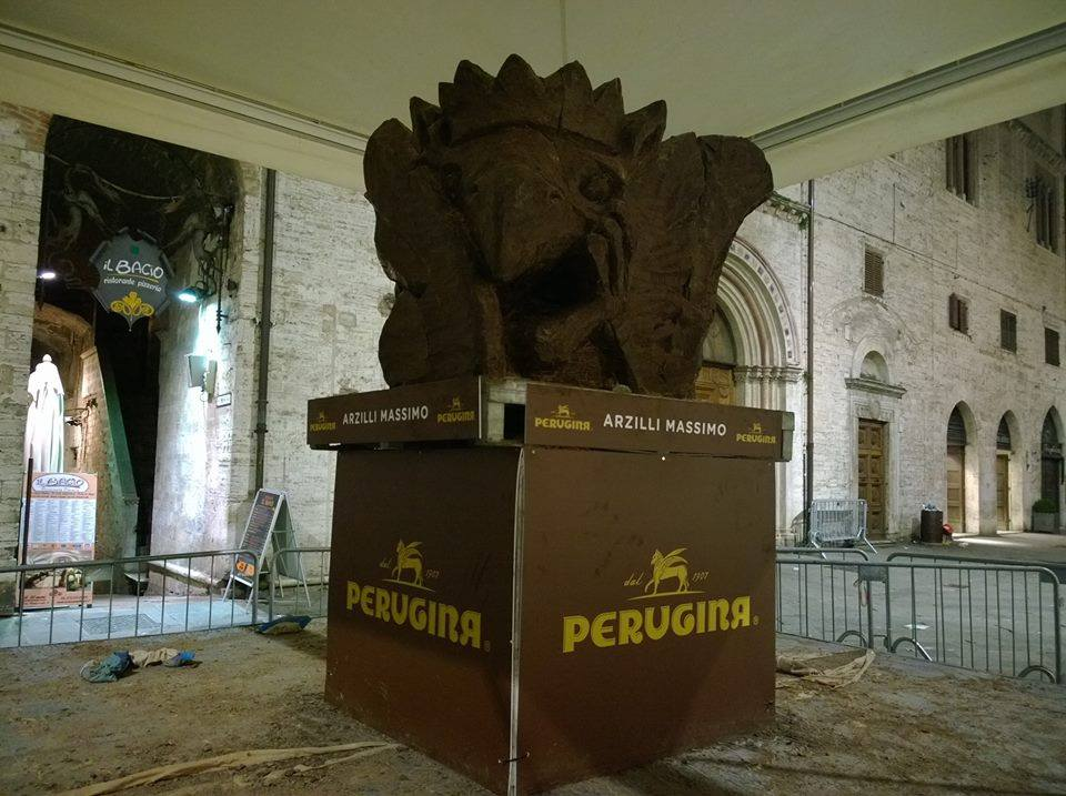 Скулптура от шоколад от празника на шоколада в Перуджа през 2013г, майстор Масимо Ардзили